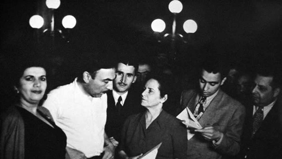 پیرنیا همراه هنرمندان و همکاران رادیو (خانم سمت چپ ملوک ضرابی )